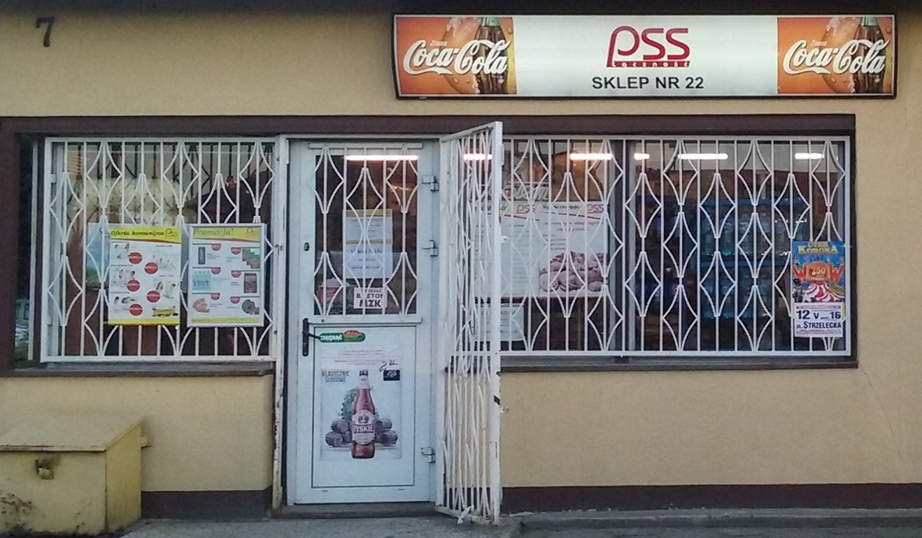 Wybudowany po 1989 roku i działający do dziś spółdzielczy sklep spożywczy PSS Społem.